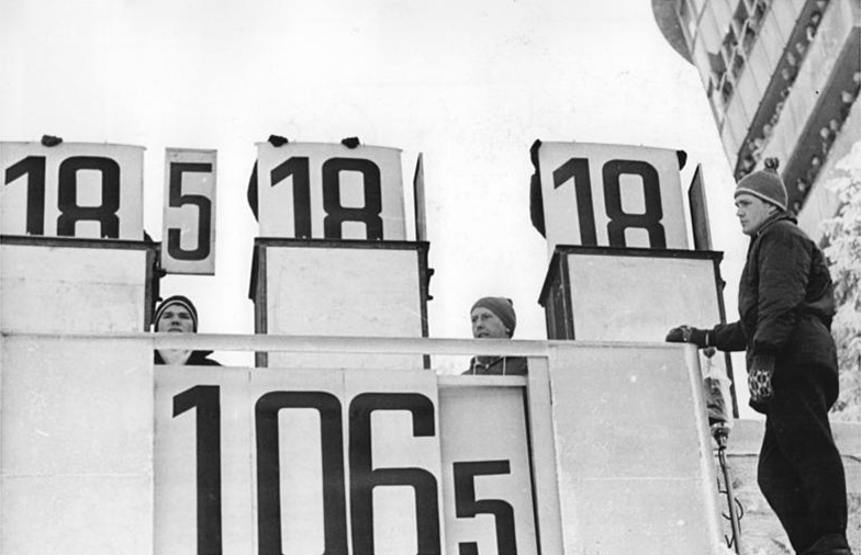 Zentralbild Kohls 22.2.1964 Nordische Skimeisterschaften in Oberhof Die Anzeigentafel zeigt die Wertung der fünf Kampfrichter. Der Zweitplatzierte Karl-Heinz Munk (SC Motor Zella-Mehlis) erreichte im dritten Sprung die Note 106,5. Im Hintergrund rechts der Kampfrichterturm. Am 21.2.1964 fand auf der neuen Schanze im Kanzlersgrund bei Oberhof das erste Werungsspringen der Deutschen Meisterschaft der Spezialspringer statt.